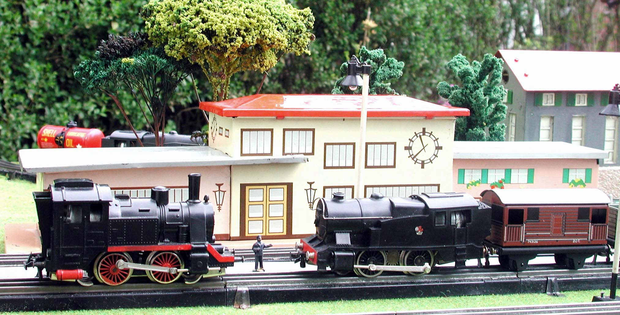 Trix Express (links) & Trix Twin Railway Batterielokomotiven aus den 1950-er Jahren, Foto: Michael Linnenbach, GNU FDL